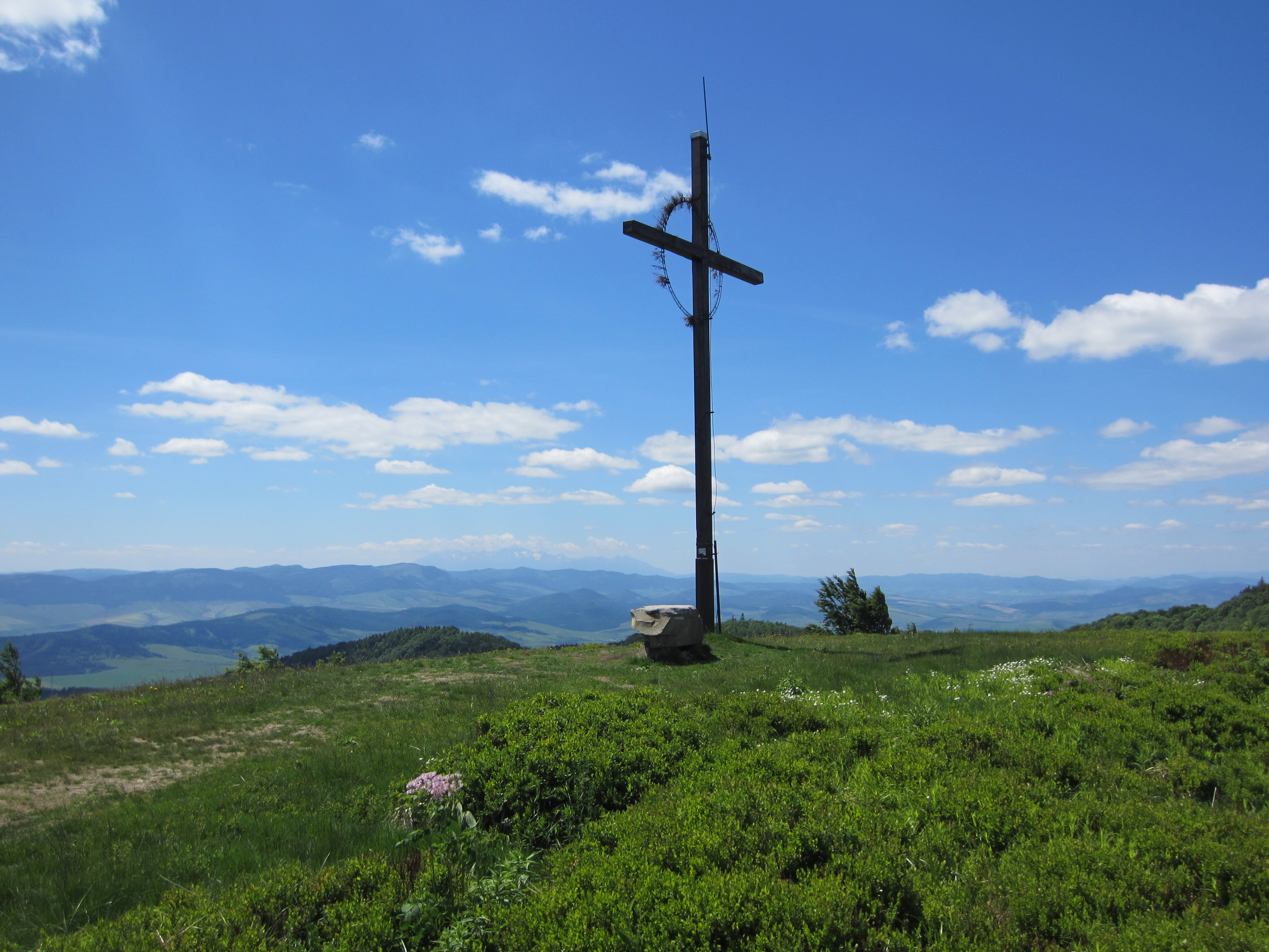 Predvchol Minčola s výhľadom smerom na Vysoké Tatry